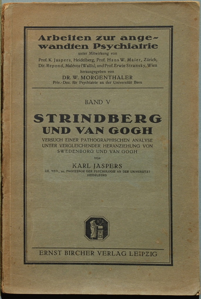 Jaspers, Karl: Strindberg und van Gogh. Versuch einer pathographischen Analyse unter vergleichender Heranziehung von Swedenborg und van Gogh. Leipzig: E. Bircher 1922, 131 Seiten. 1.Auflage. Orig.-Broschur mit Fadenheftung, 23 x 15,5 cm.